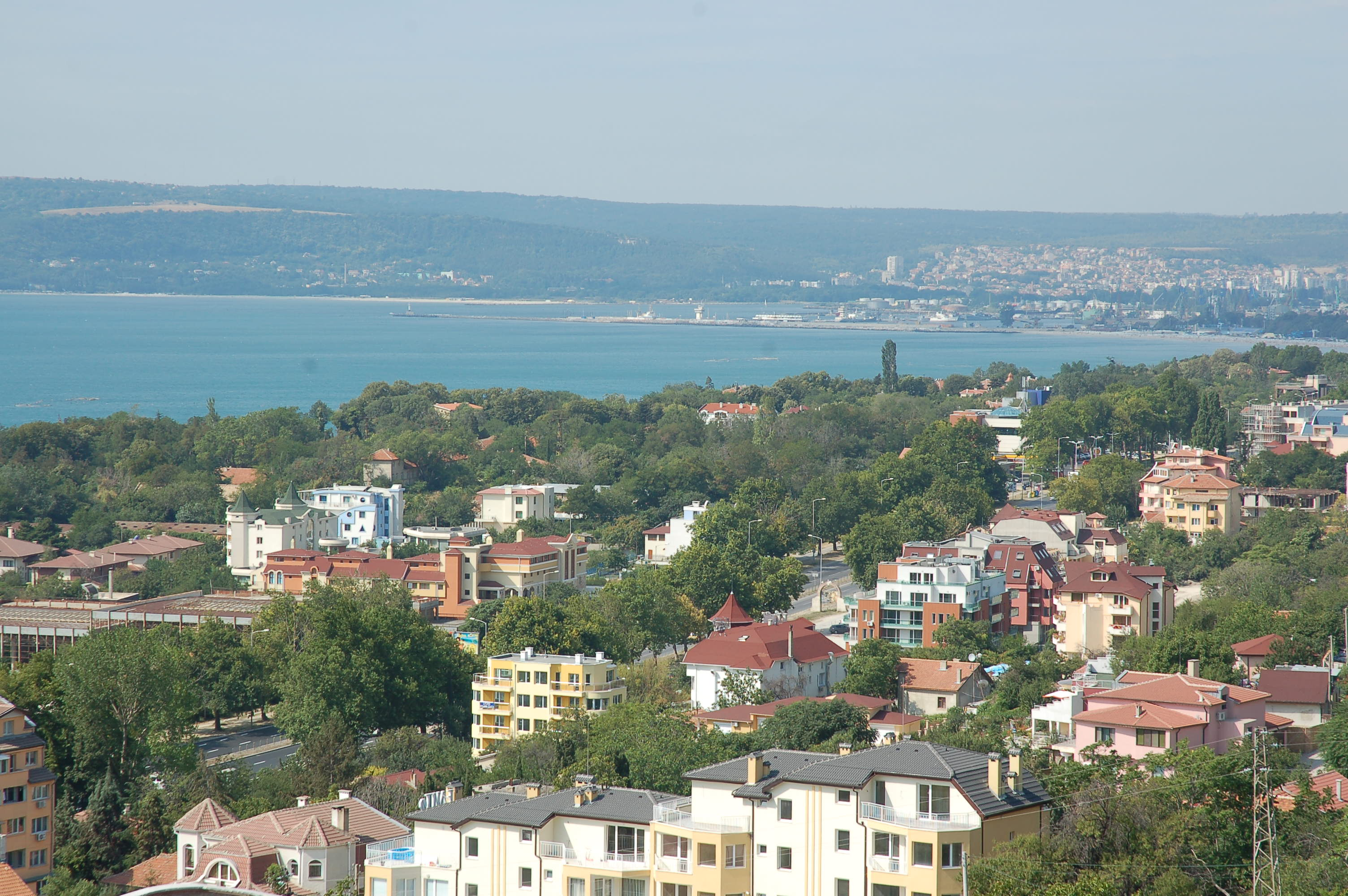 Varna Bay. View from Sveti Nikola